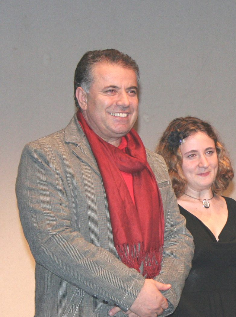 Safarbek Soliev au festival international des cinémas d'Asie 2008